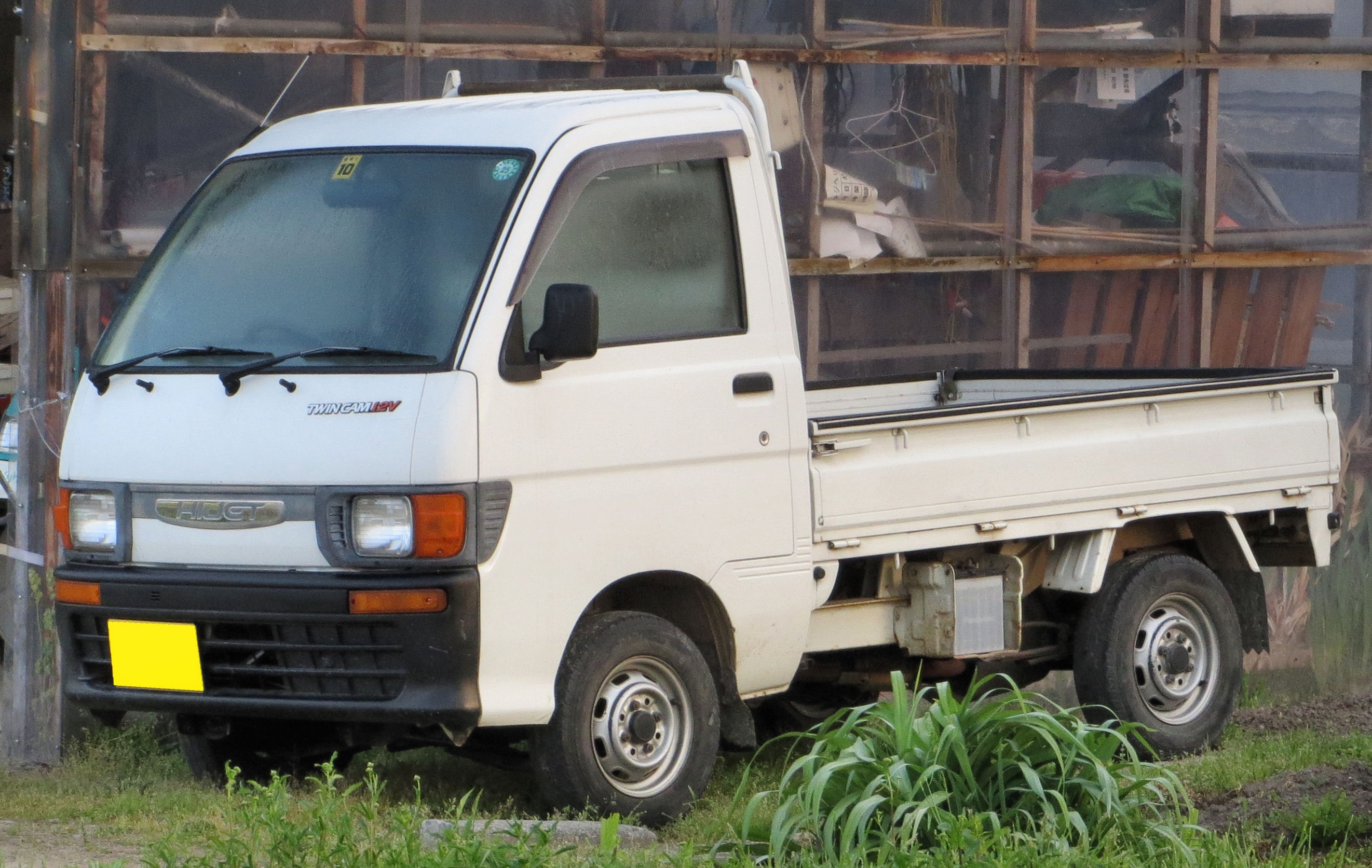 ダイハツハイゼットトラック4WD(S110P)